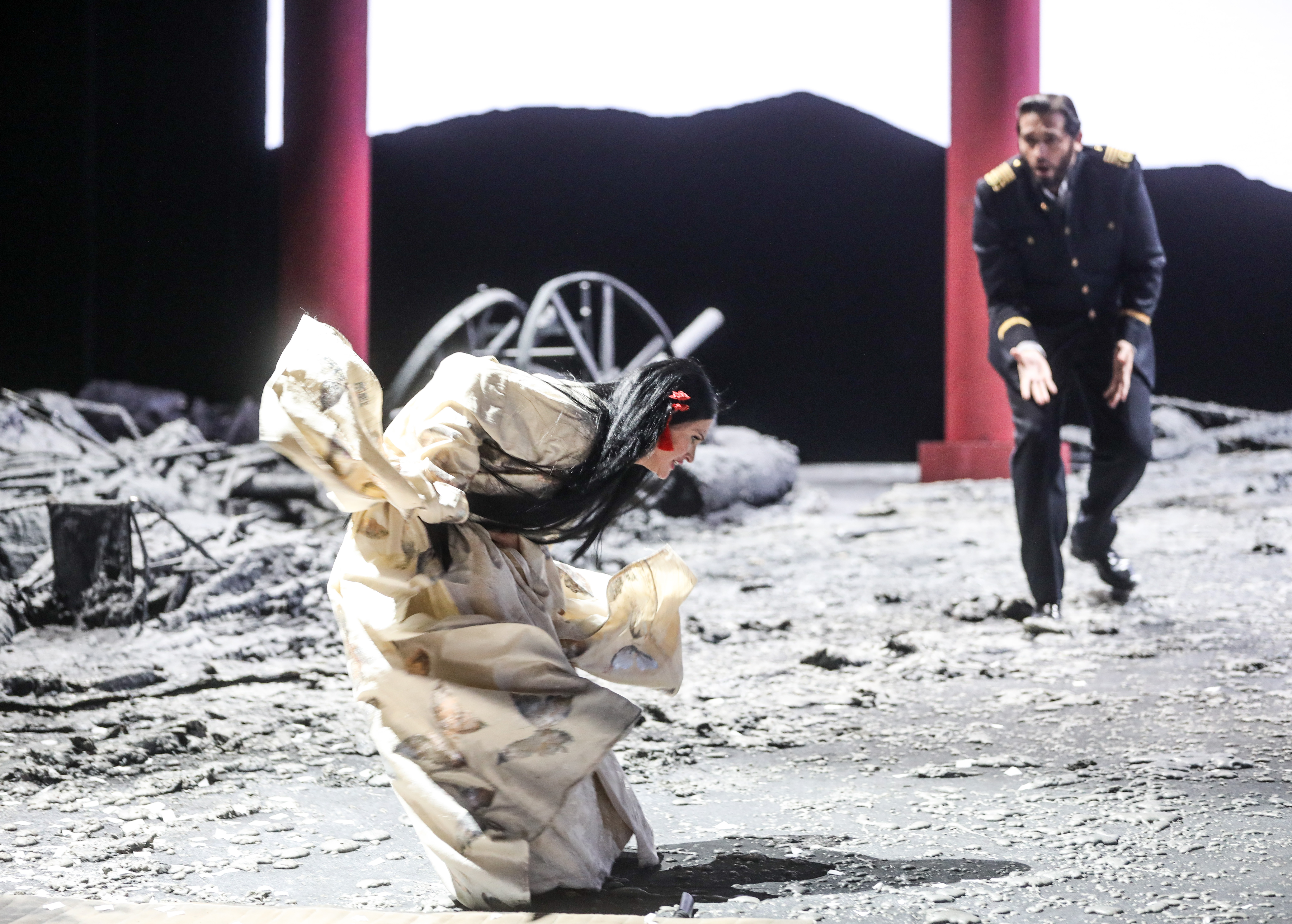 © Quincena Musical- Iñigo Ibáñez